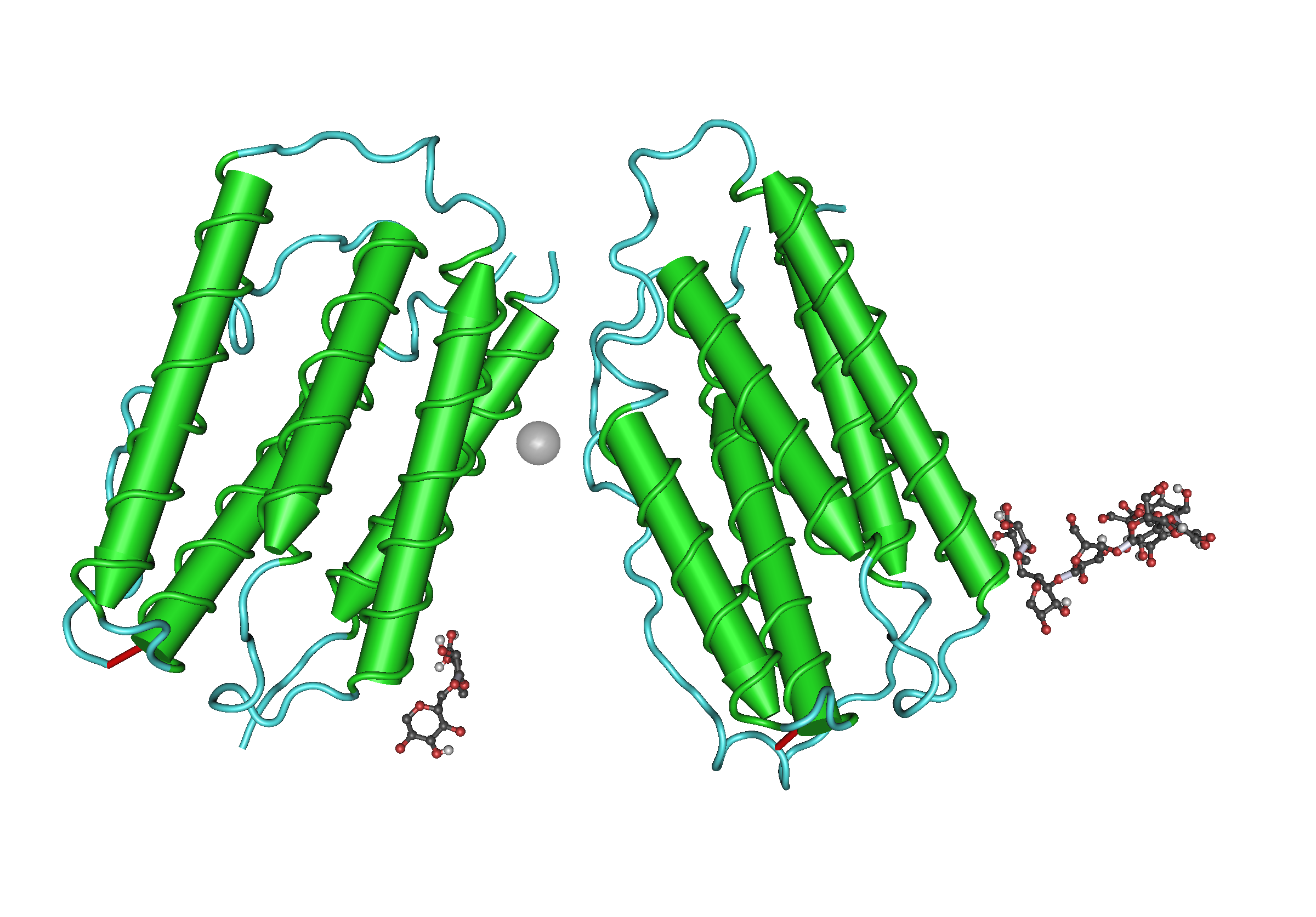 1AU1_Human_Interferon-Beta